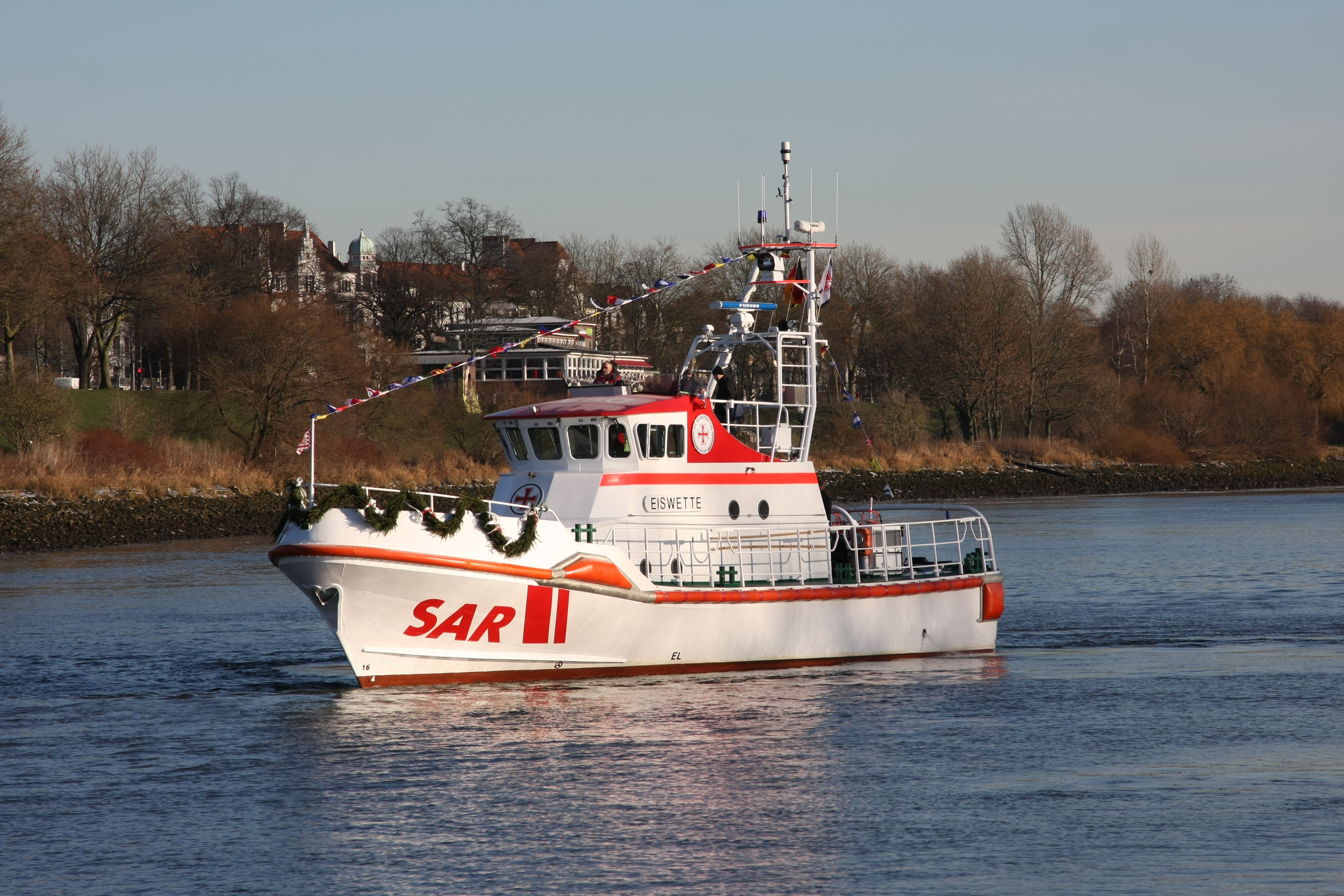 SK Eiswette (II) kurz nach der Taufe anlässlich der Bremer Eiswette